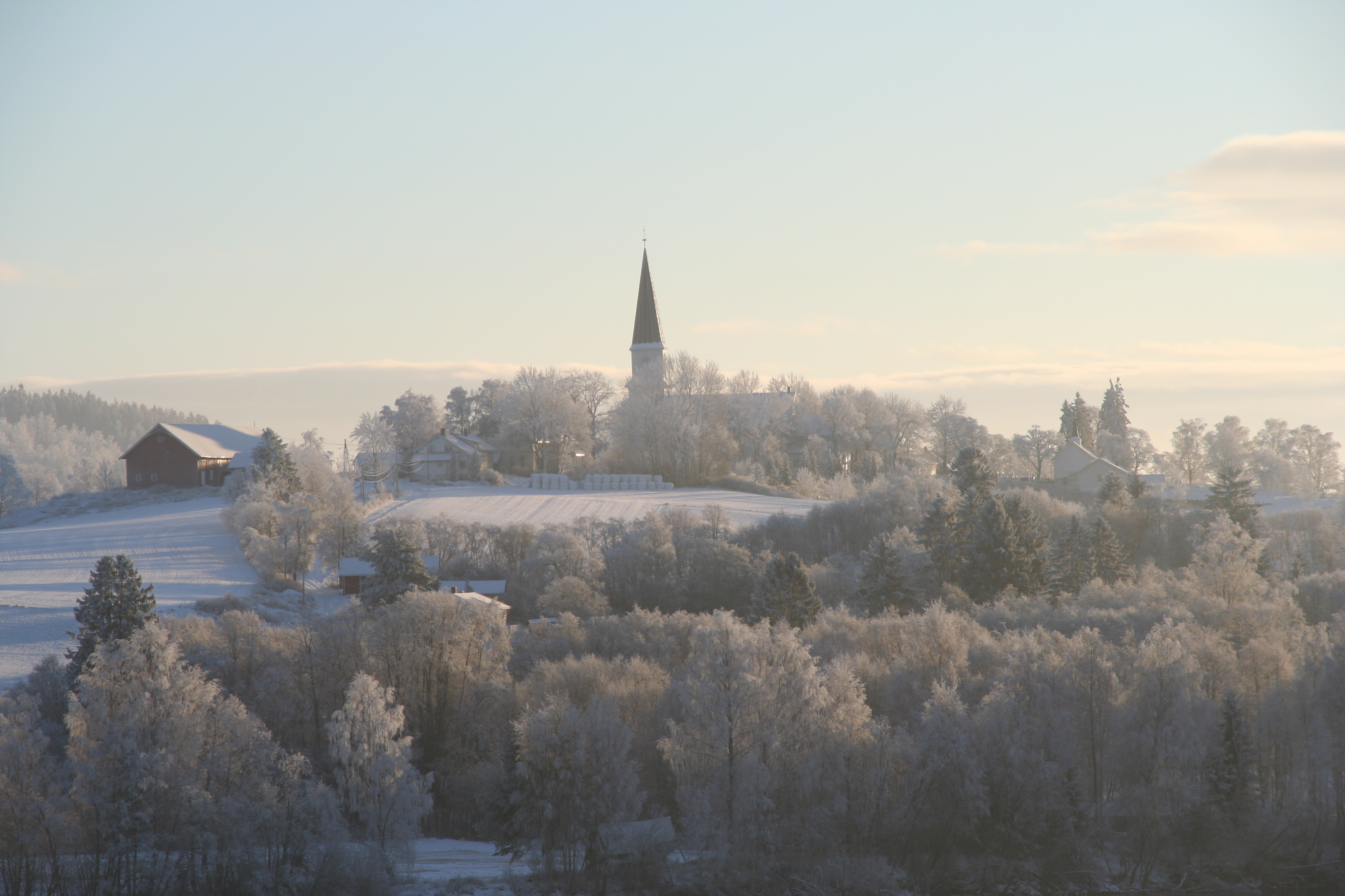 no: Fet kyrkje en: Fet church